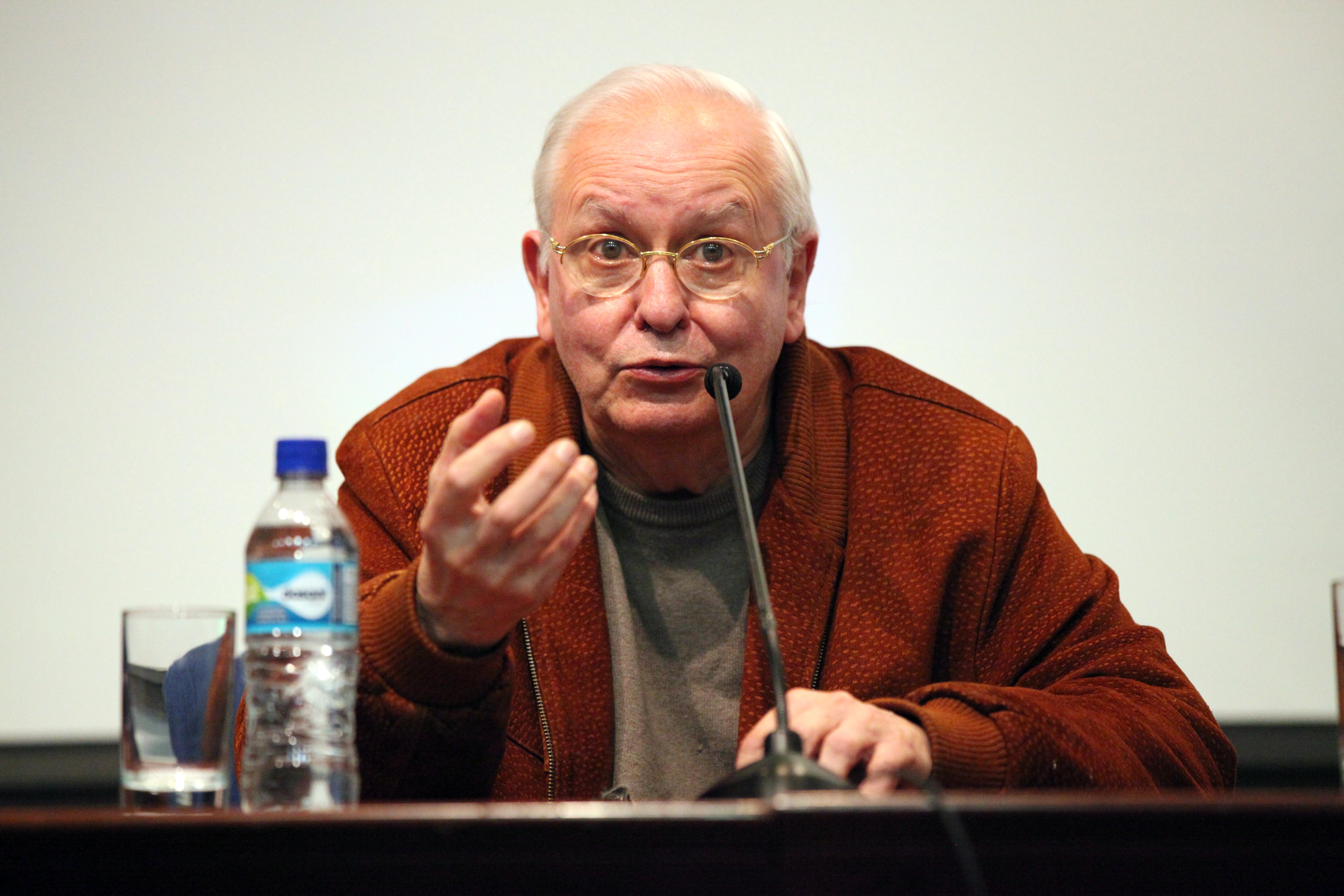 Quito (Ecuador), 16 de mayo del 2012.- Presentación del Documental CATASTROIKA y Presentación de la Revista Debates y Combates. Interviene el Profesor Ernesto Laclau. Foto: Xavier Granja Cedeño/Ministerio de Relaciones Exteriores, Comercio e Integración.